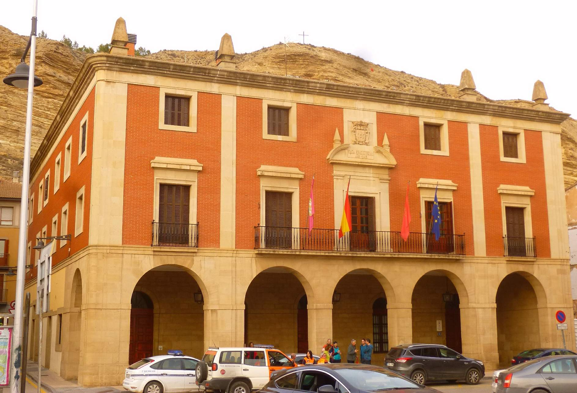 Ayuntamiento de Lodosa (Navarra)